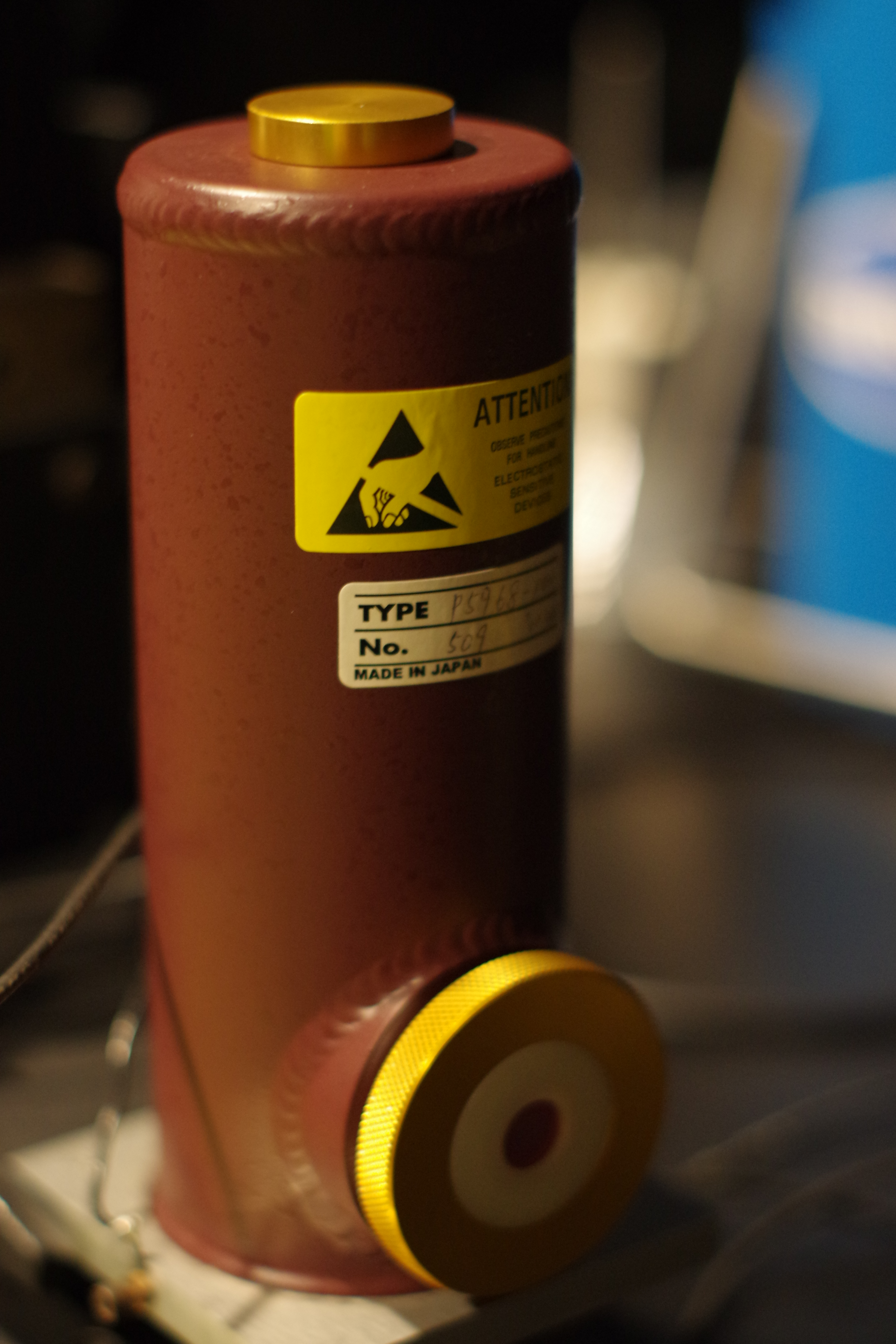 Exemple de détecteur infrarouge, SupOptique